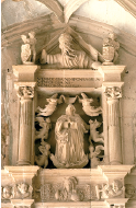 Iratxe monastegiko ate zoragarria